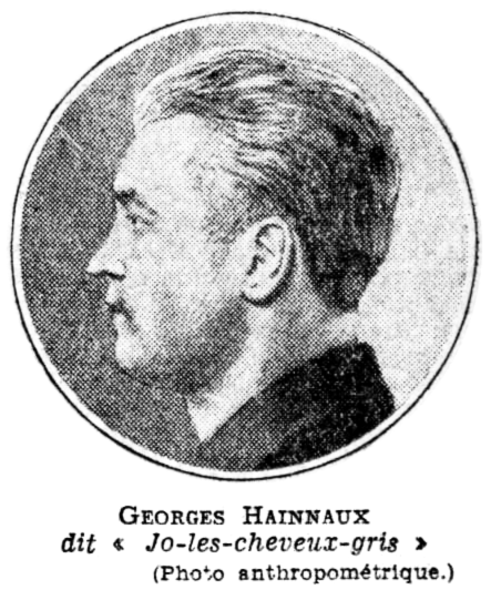 Georges Hainnaux, dit "Jo la Terreur", indicateur de l'inspecteur Pierre Bonny, photographie anthropométrique publiée par Le Journal du 26 mars 1934